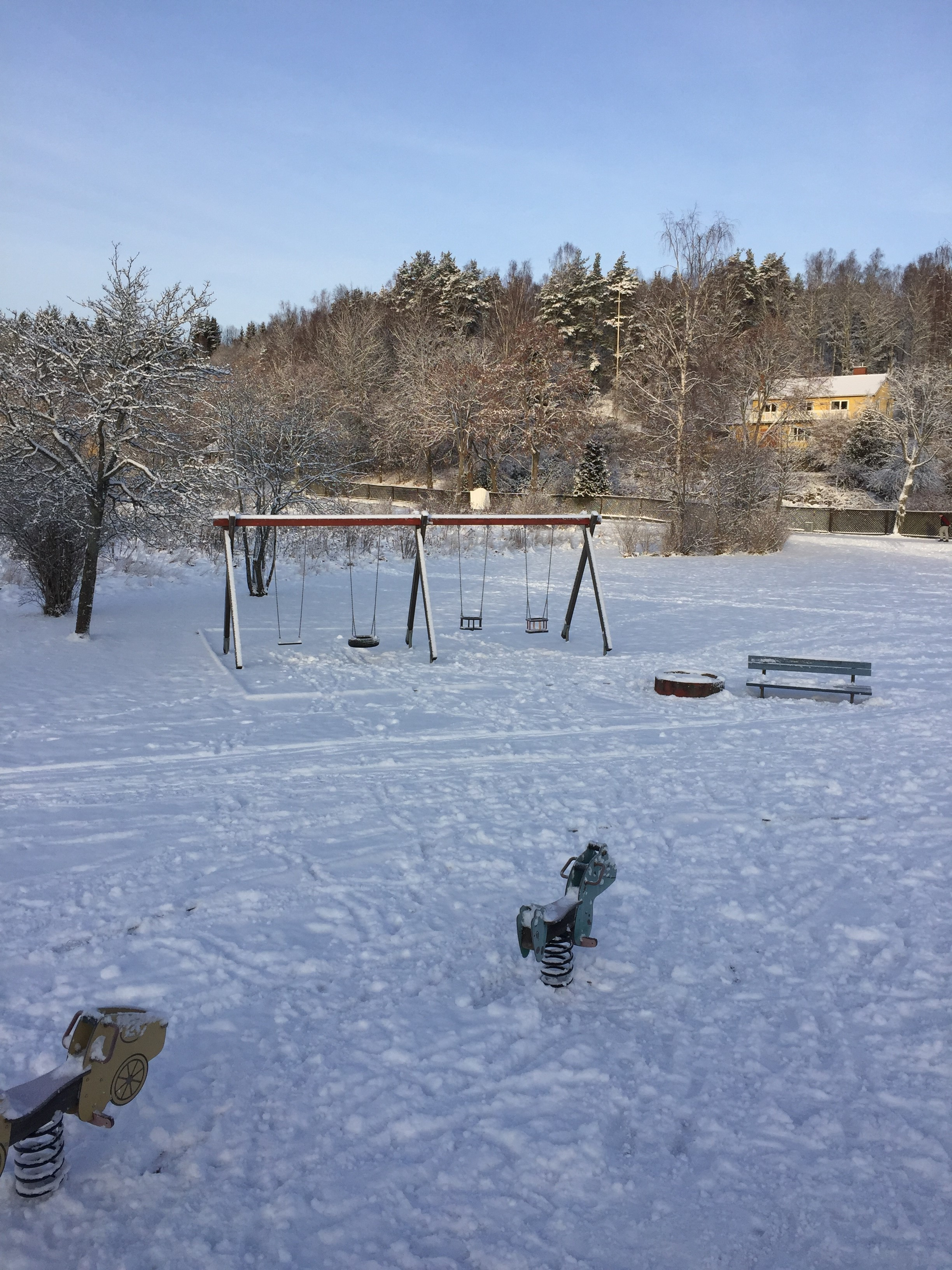 Den till företaget tidigare "Direktörsvillan" i fonden.